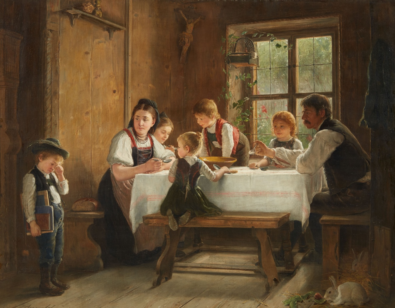 Weinender Junge beim Mittagsmahl in der Bauernstube. Öl auf Leinwand. 72,5 x 90 cm. Signiert unten links: Aug Heyn.